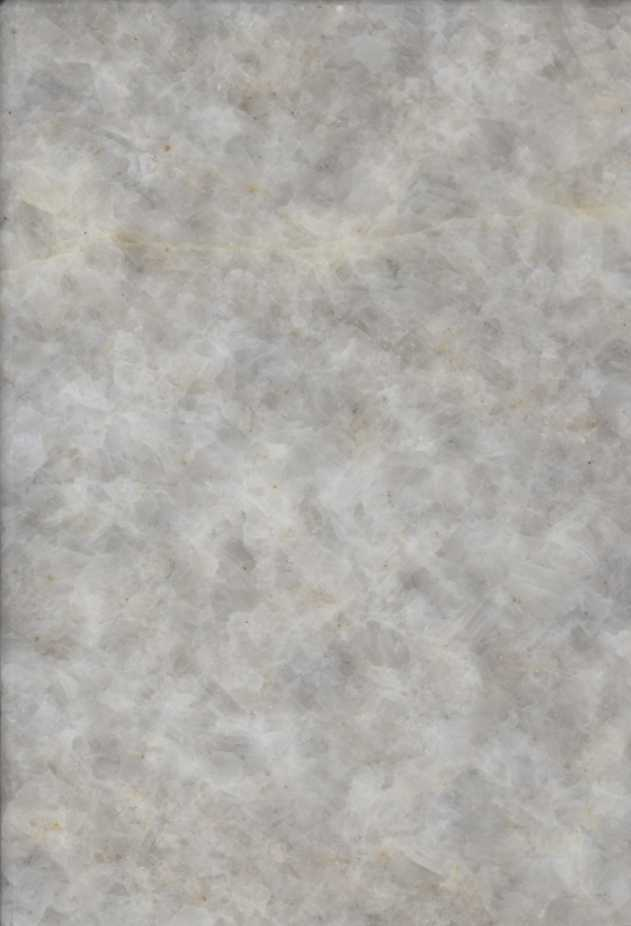 Supimarm